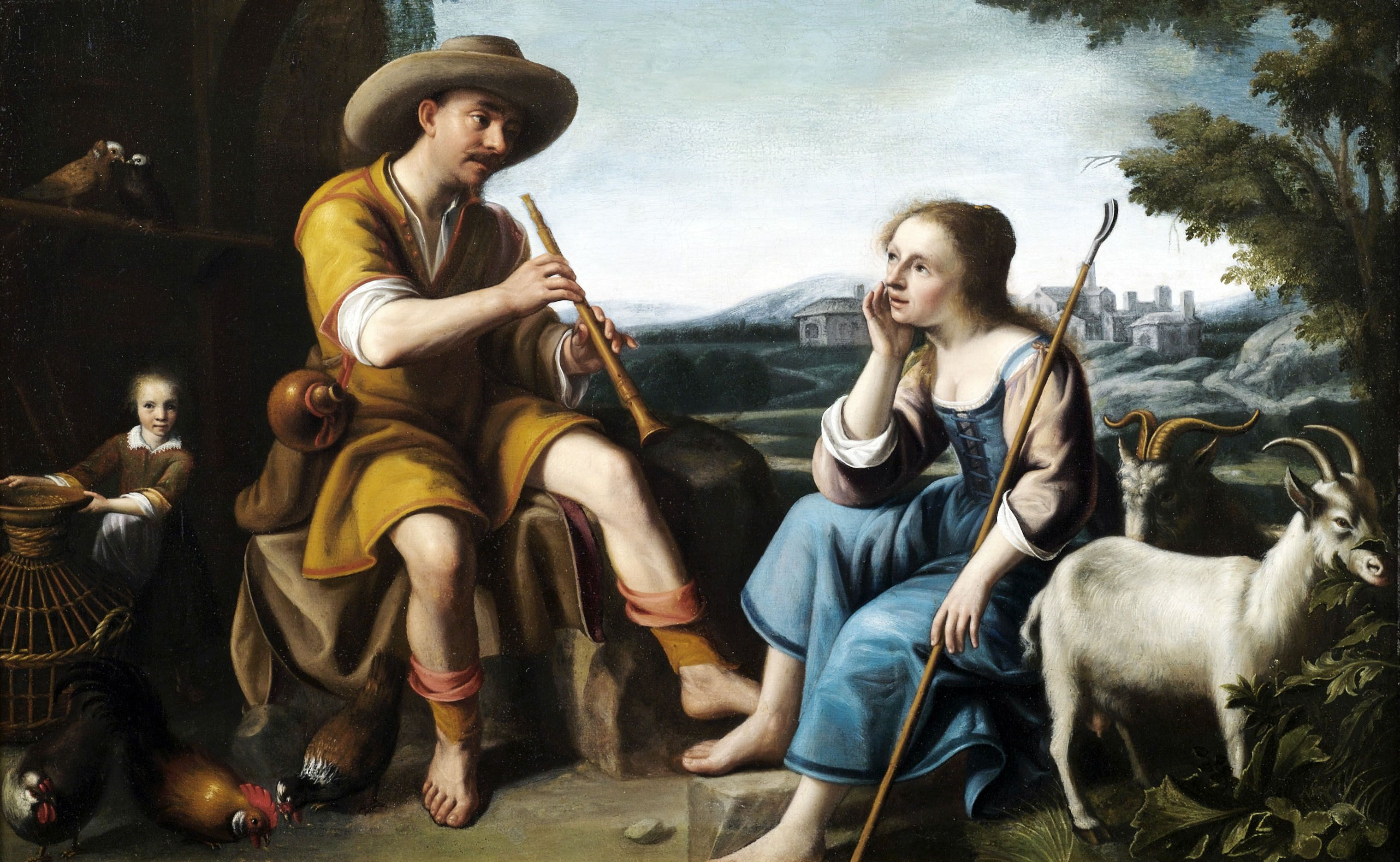 Pastorale Szene mit einer Hirtenfamilie vor Landschaftshintergrund